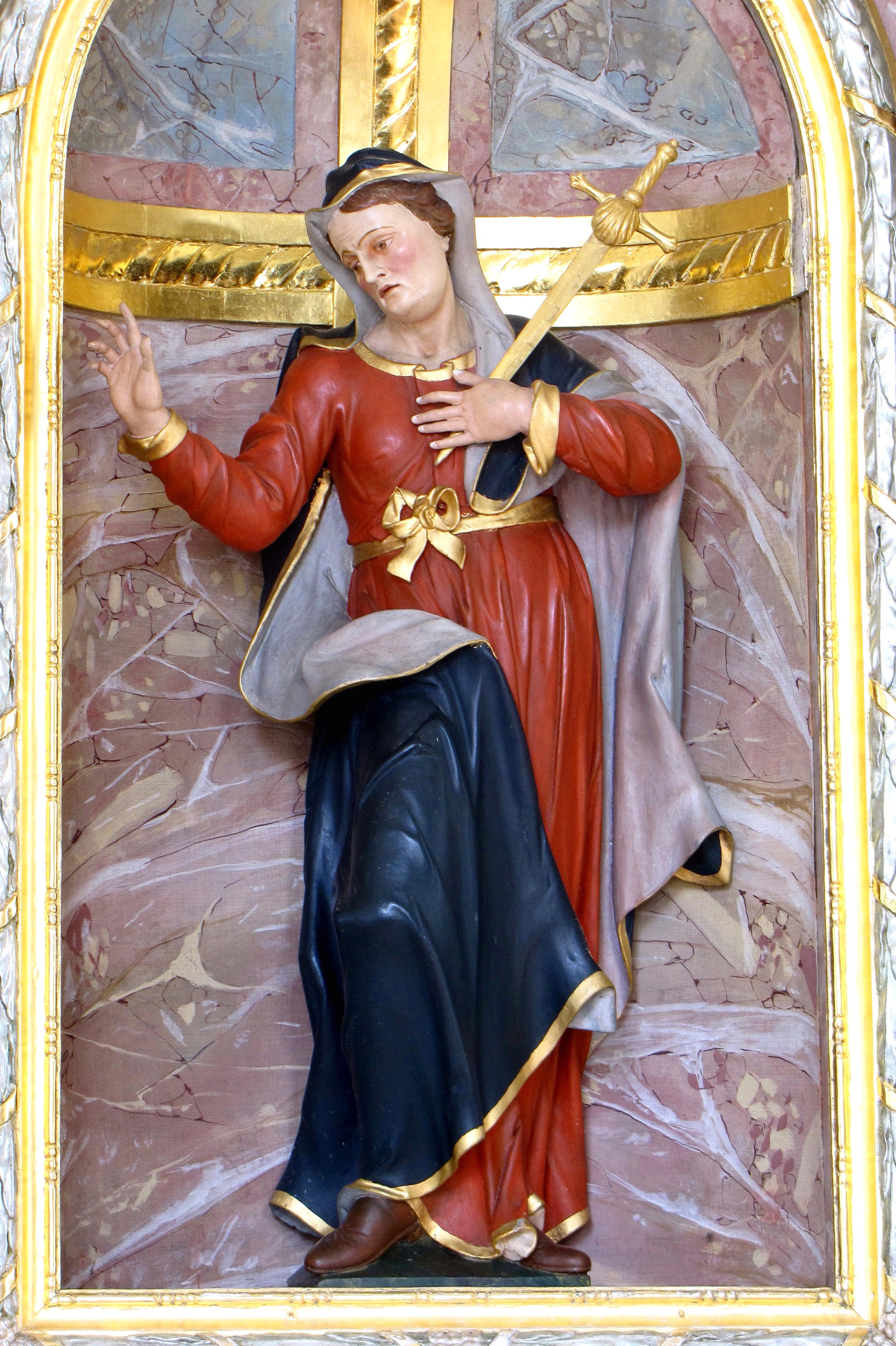 Figur der Schmerzensmutter von Johann Sigmund Hitzelberger, 1798, in der Kapelle St. Koloman in Pfronten-Ösch